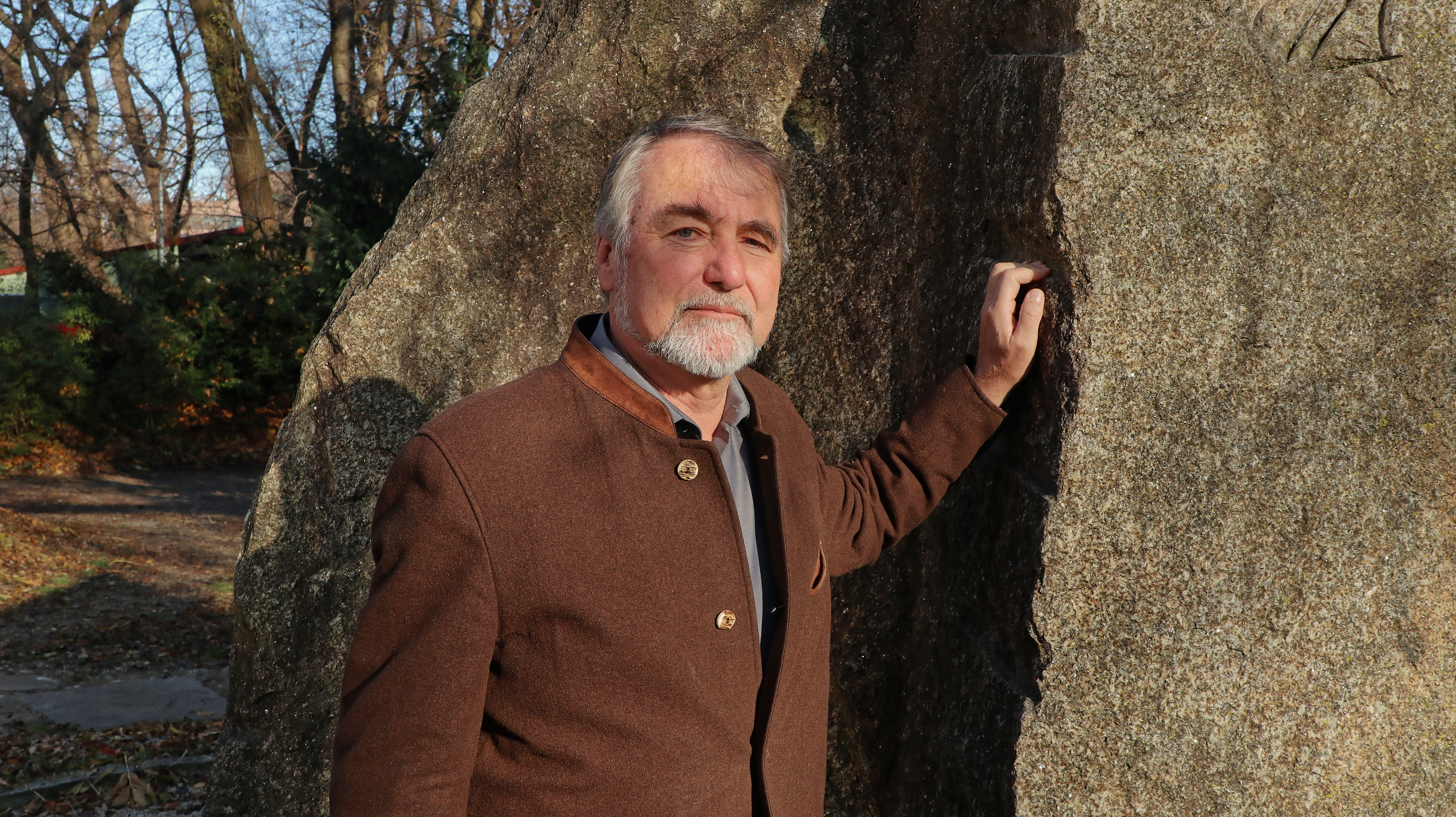 Roland Stierle, Präsident der European Union of Mountaineering Associations (EUMA) und Vizepräsident des Deutschen Alpenvereins/DAV